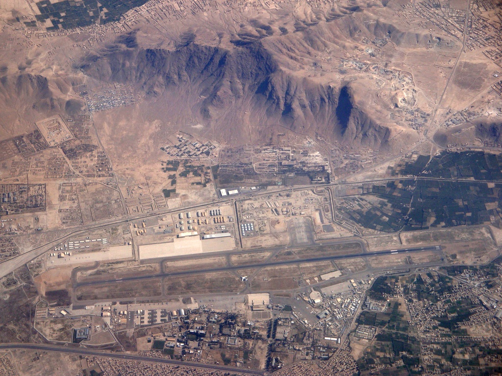 Kabul Airport